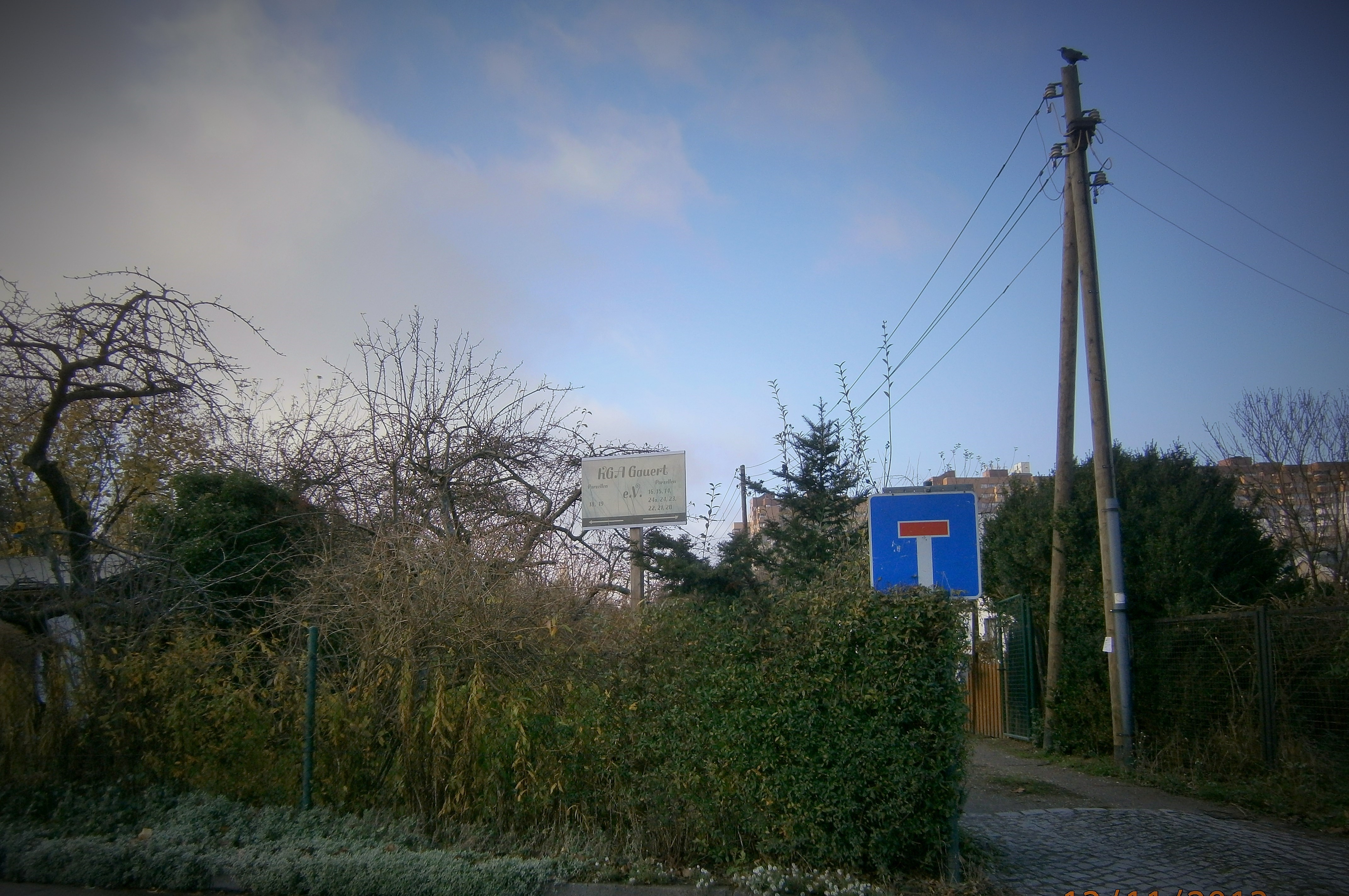 Uhlandstraße ist eine Straße in Berlin-Wilhelmsruh. Hier der Blick auf die Kolonie Gauert an der Westseite.